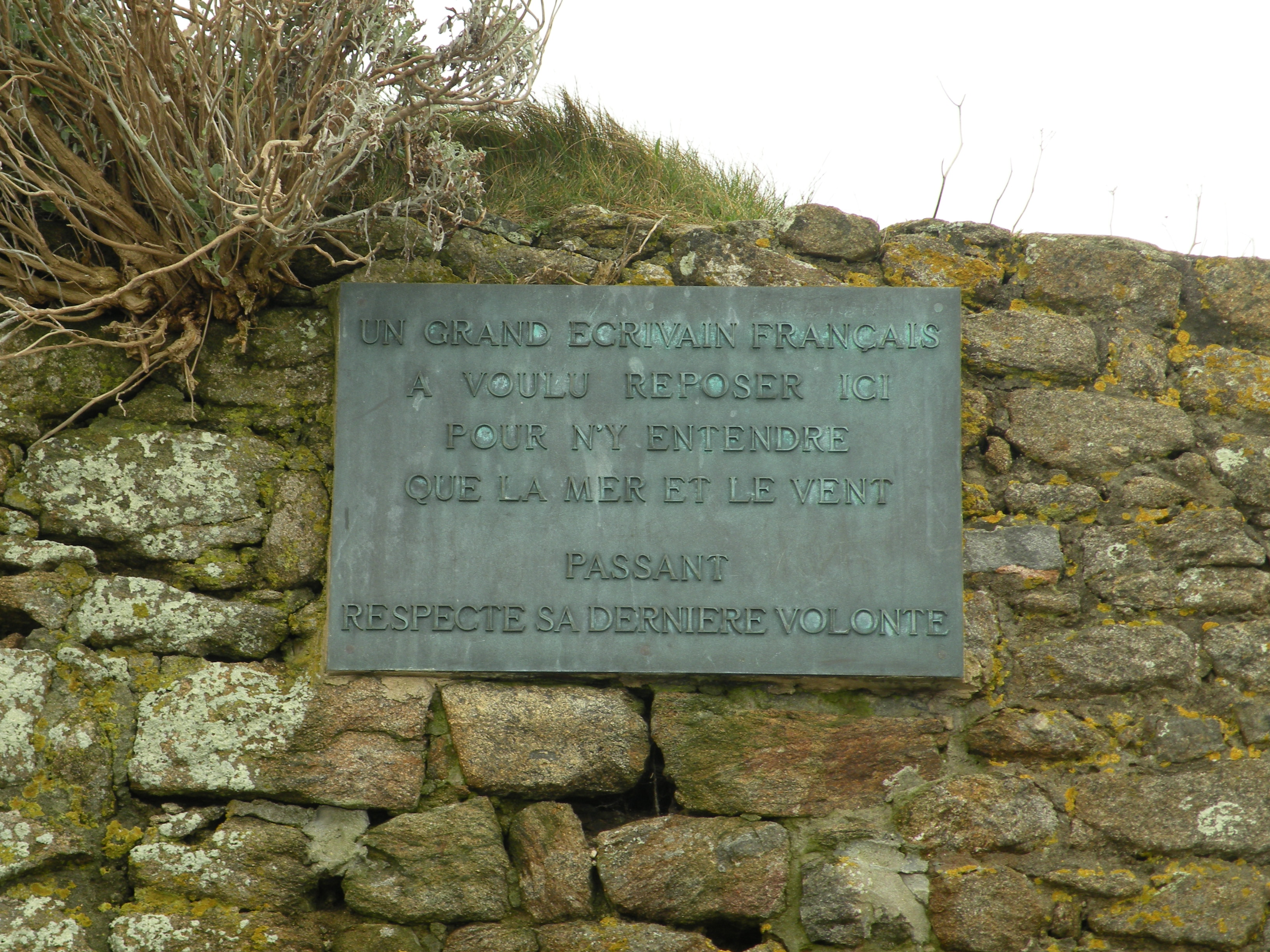 Plaque commémorative près de la tombe de Chateaubriand sur l'île du Grand Bé en face de Saint-Malo.